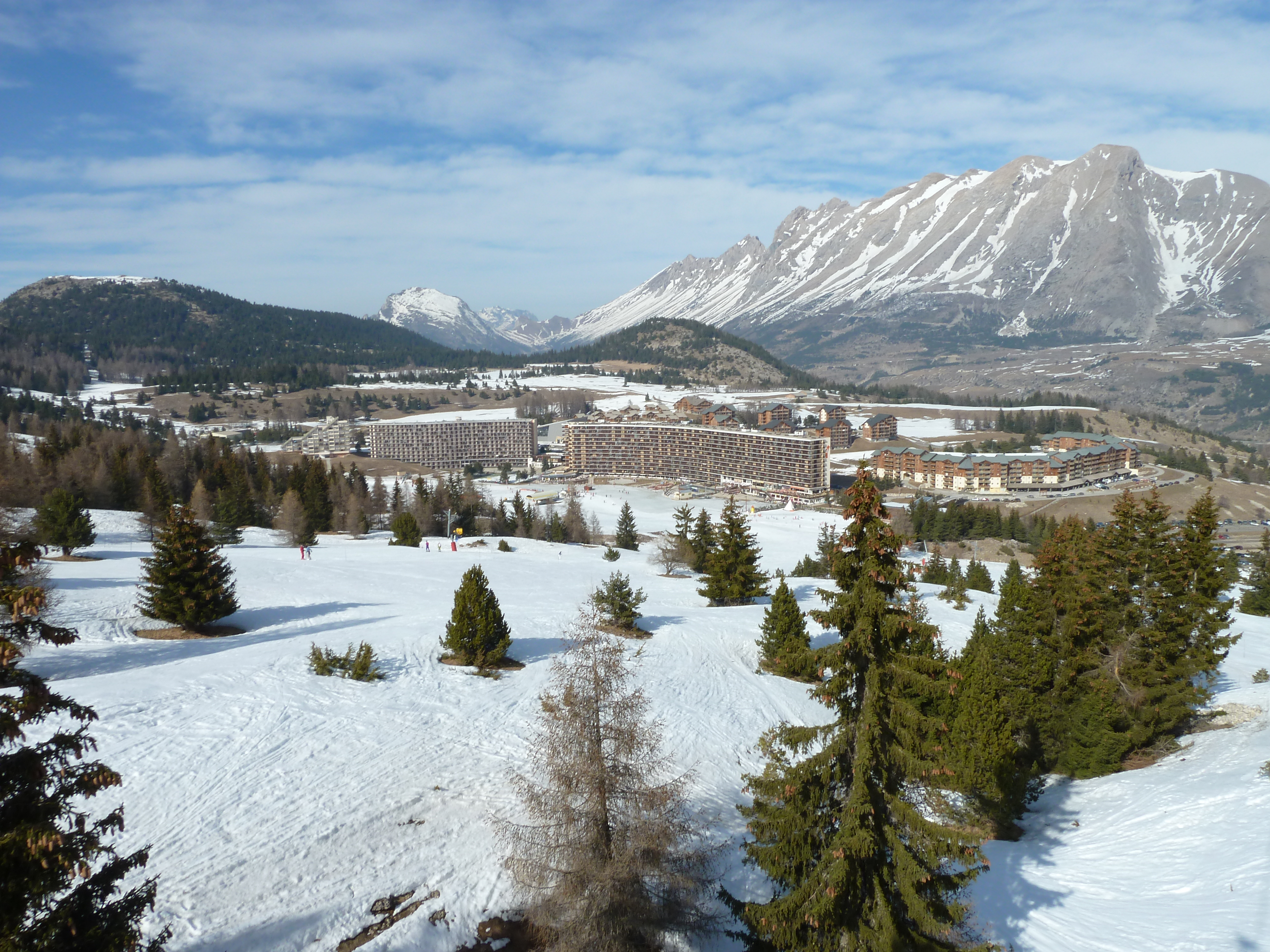 Vue générale de SuperDévoluy depuis le Pelourenq